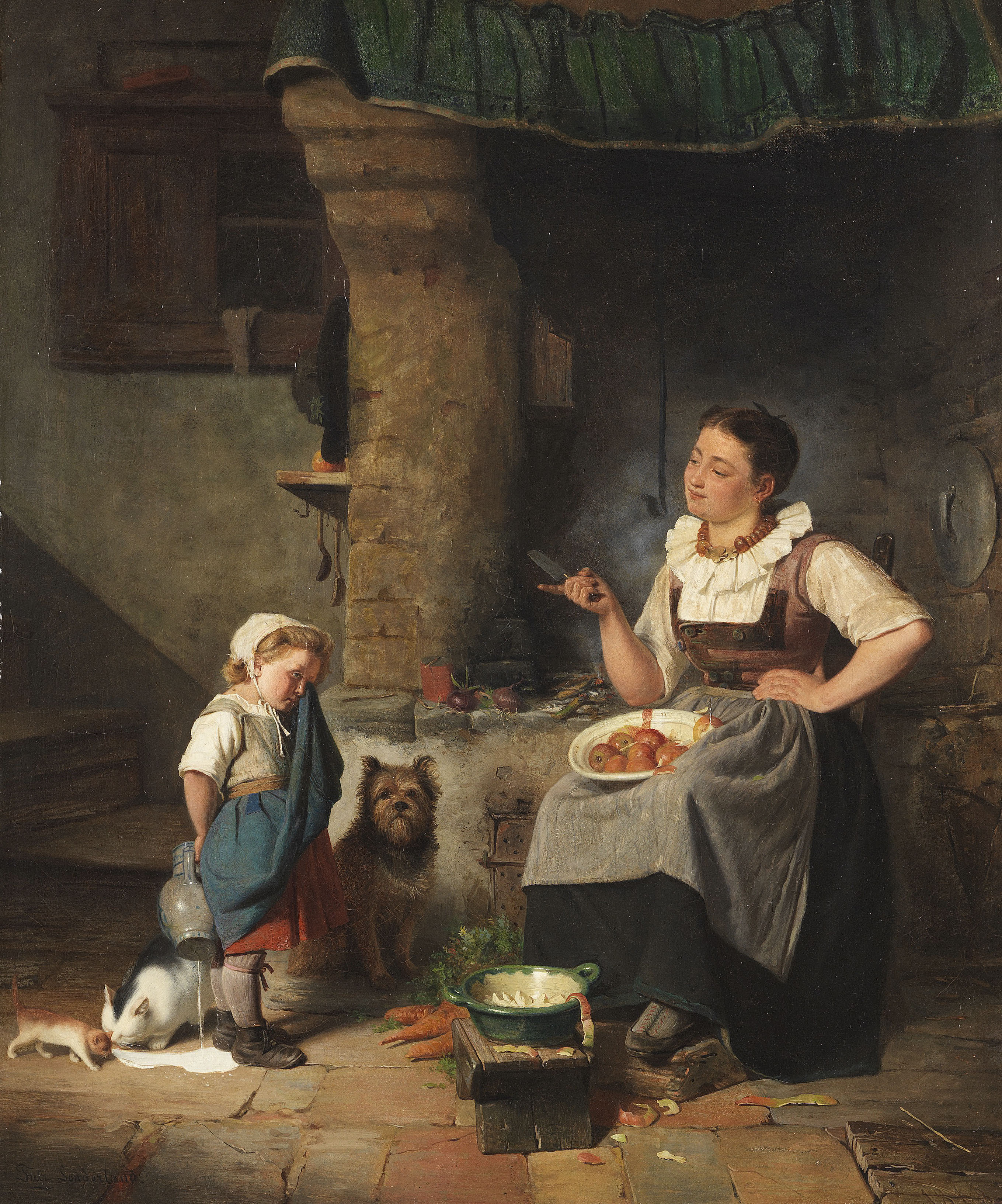 Das kleine Malheur. 1868. Öl auf Leinwand. Links unten signiert, rechts unten datiert. 63 x 52,5 cm. Provenienz: Kunsthandlung Galerie Hugo Othmar Miethke, Wien (verso mit dem Etikett). Privatsammlung in Nordrhein-Westfalen